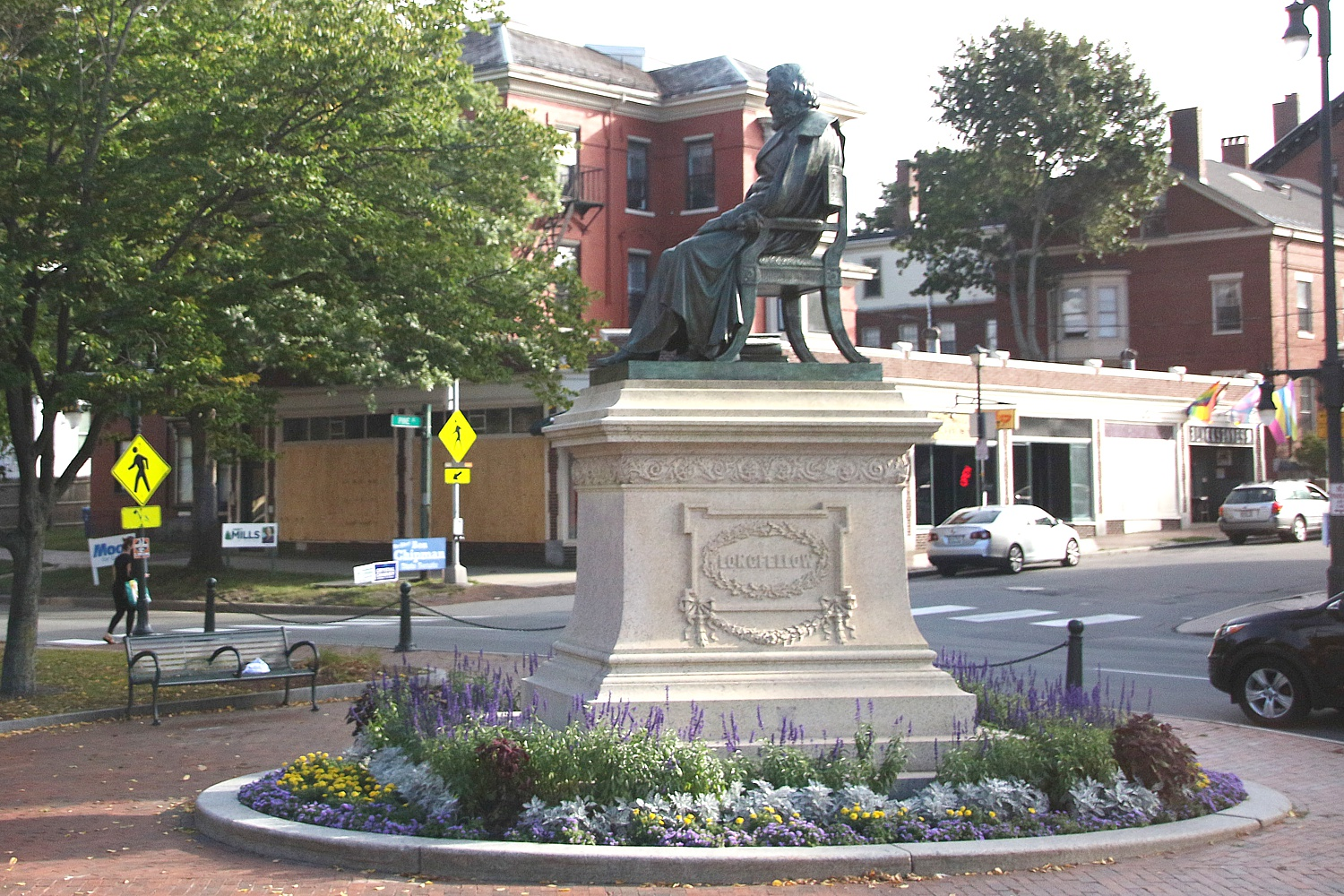 Denkmal von Henry Wadsworth Longfellow auf dem Longfellow Square in Portland, Maine, USA.